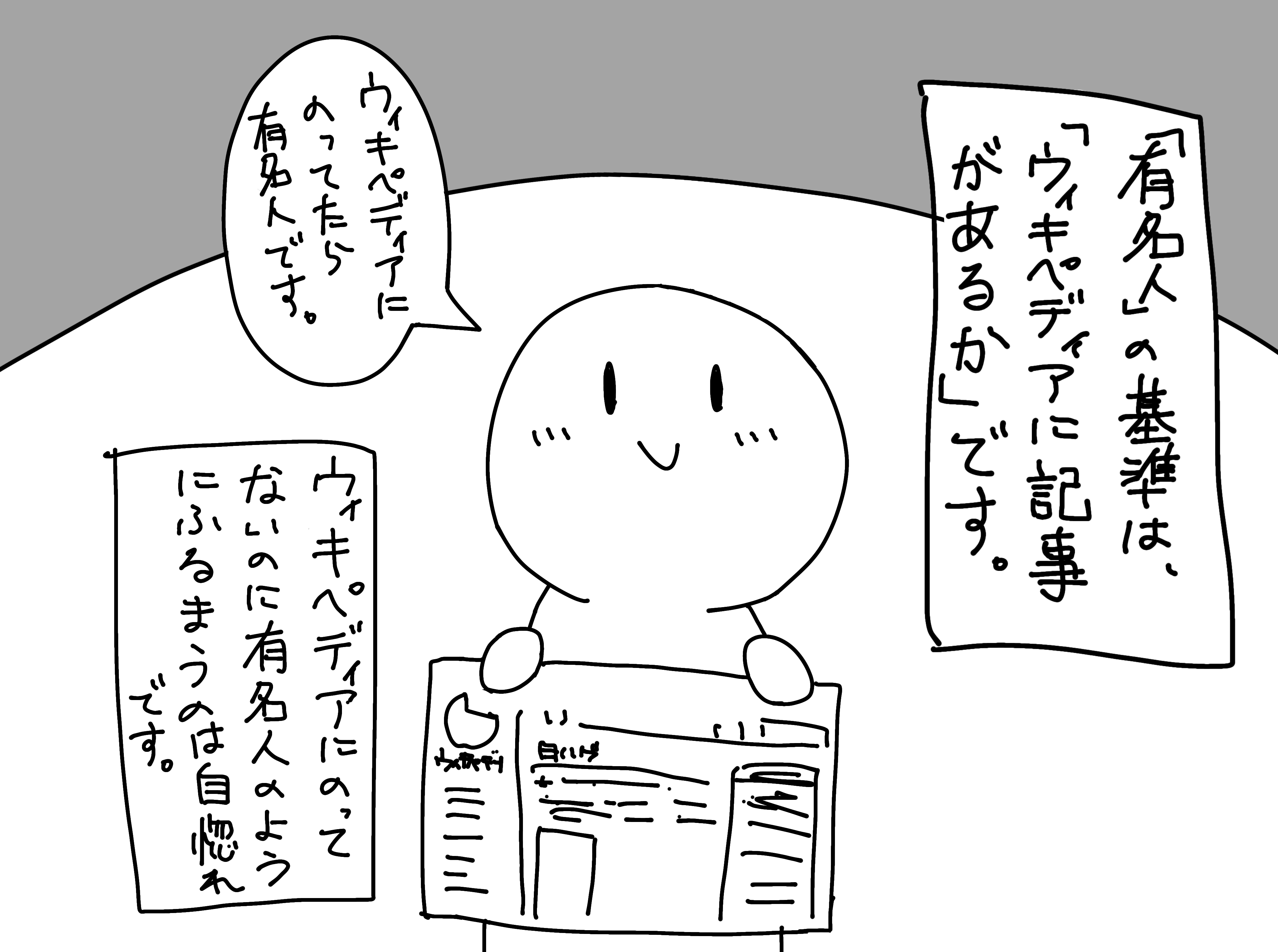 SNS上で自分の意見を代弁させる際などに用いられるキャラクタ、通称「白ハゲ」を用いた漫画表現の例